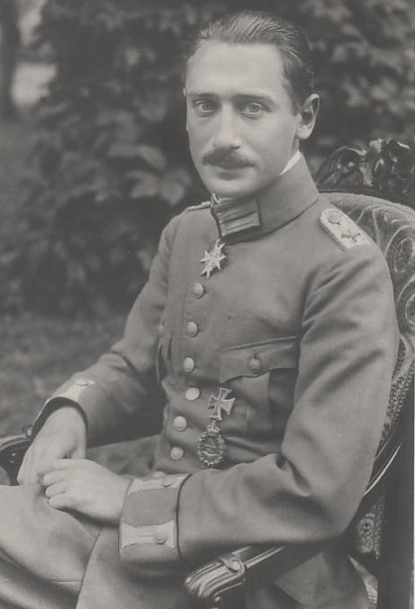 Leutnant Wilhelm Frankl, Jagdflieger an der Westfront